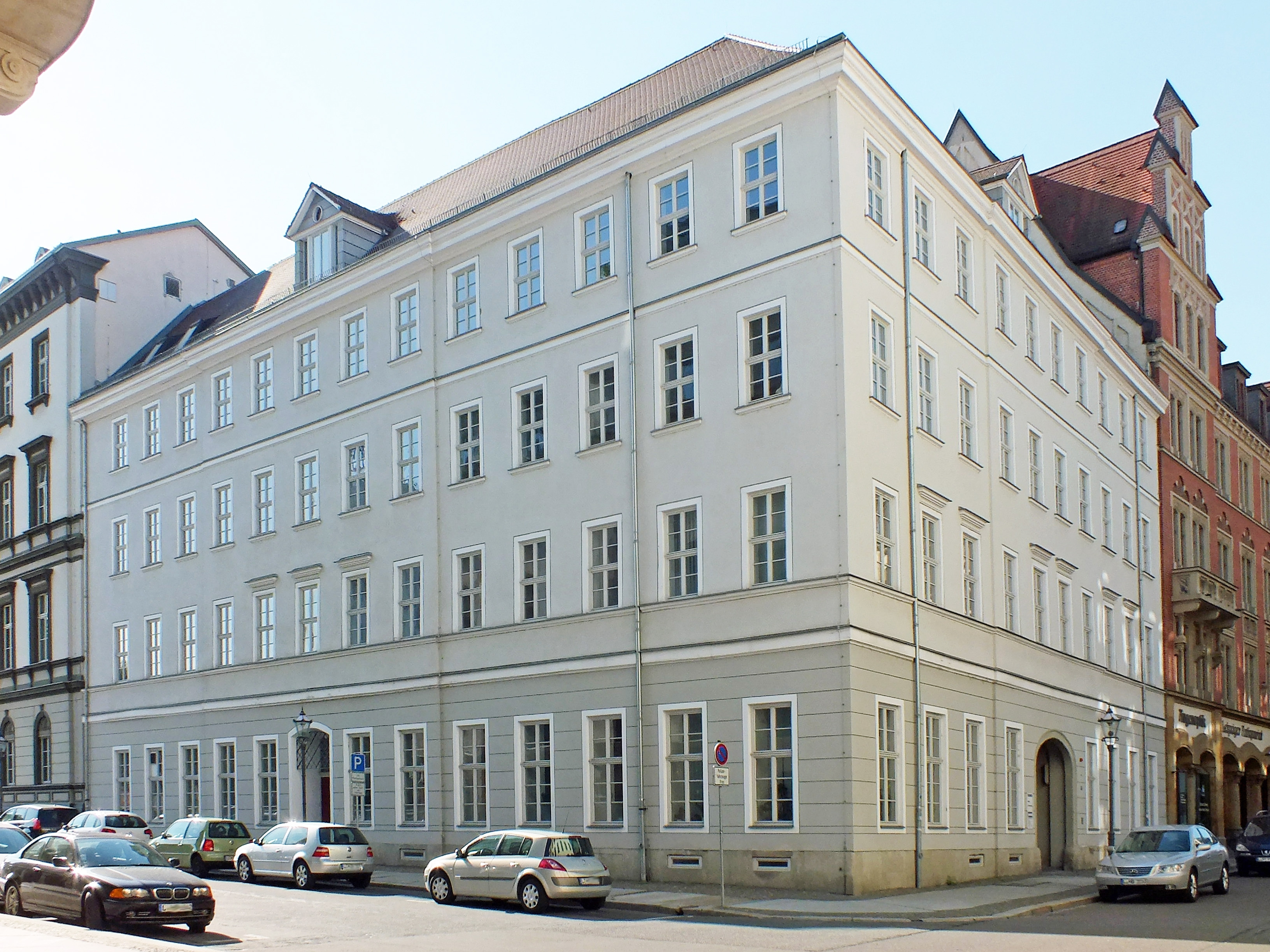 Das ehemalige Kleine Kolleg der Universität Leipzig